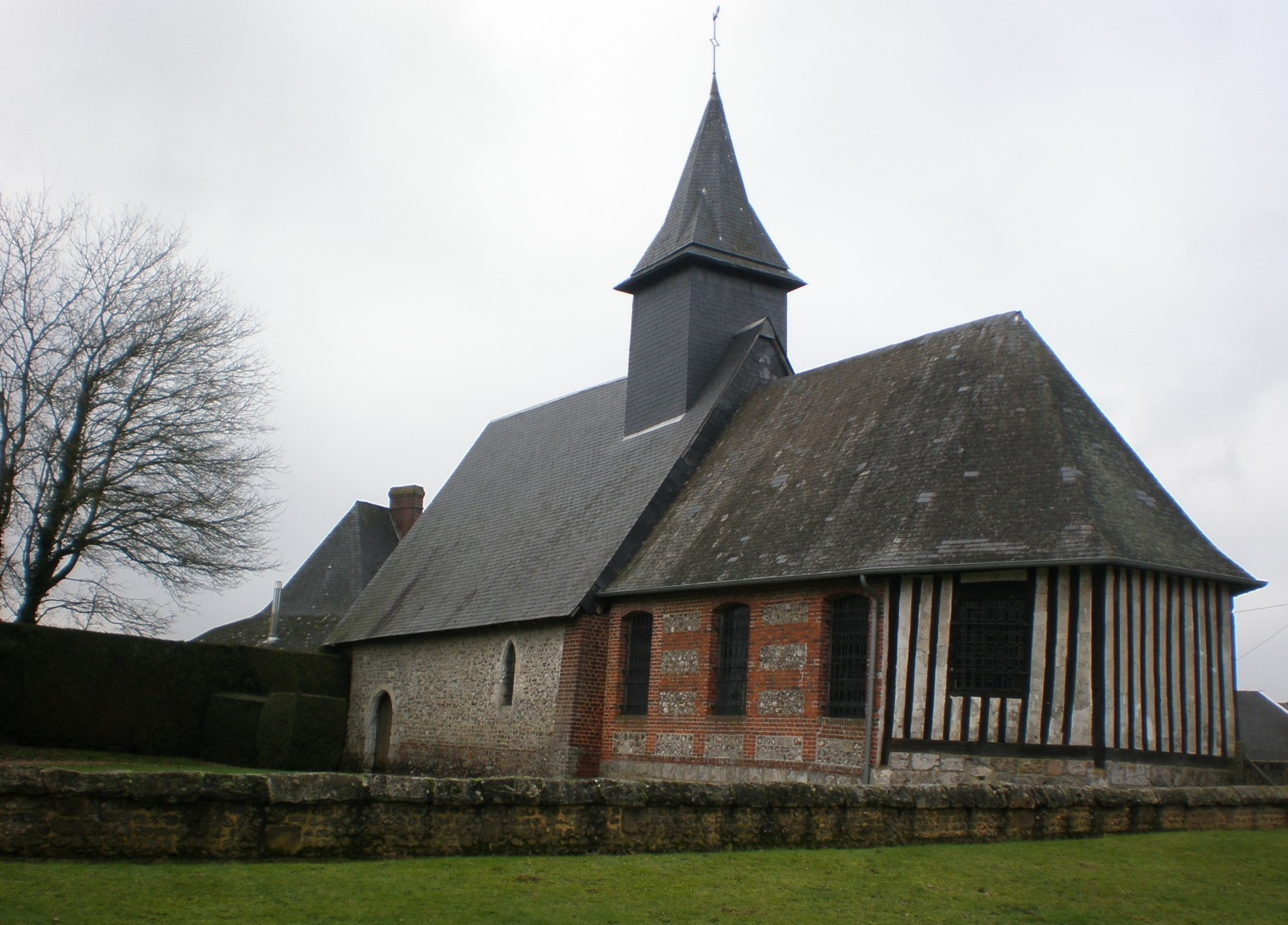 La chapelle du hameau des Authieux